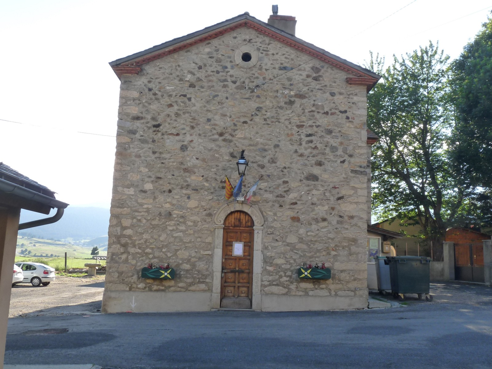 Mairie de Puyvalador, Pyrénées-Orientales, France